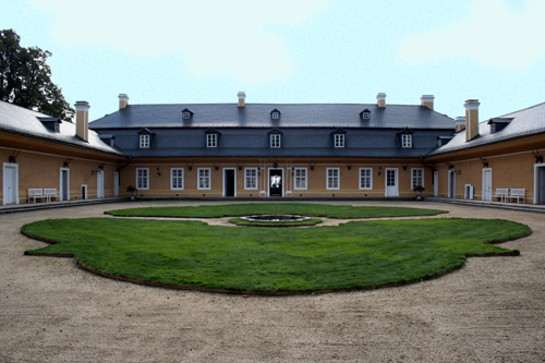 Nádvoří klasicistního loveckého zámku Kozel v okrese Plzeň-jih, Česká republika.